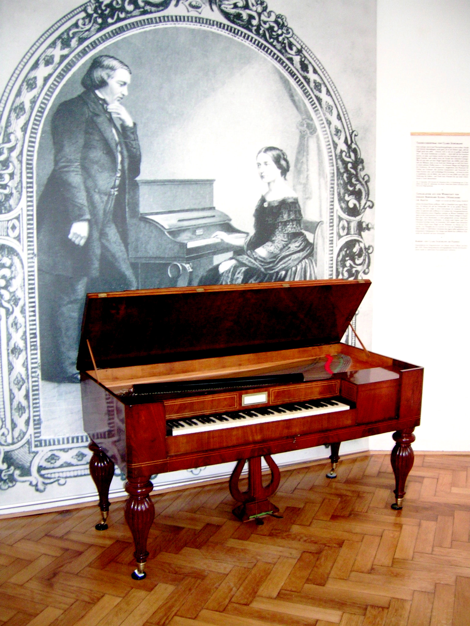 Klems square piano, 1840-1850 (Heinrich-Heine-Institut Duesseldorf)